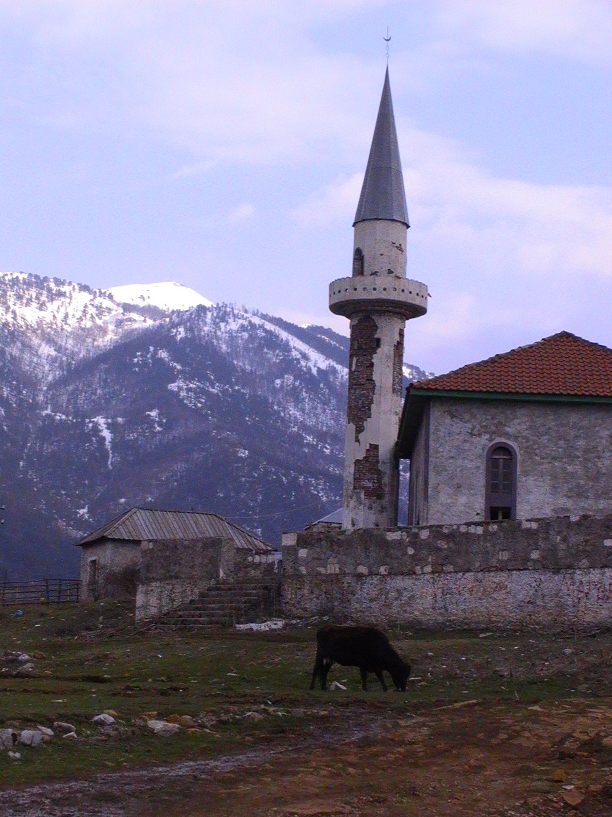 Mosque in Lurë, Albania